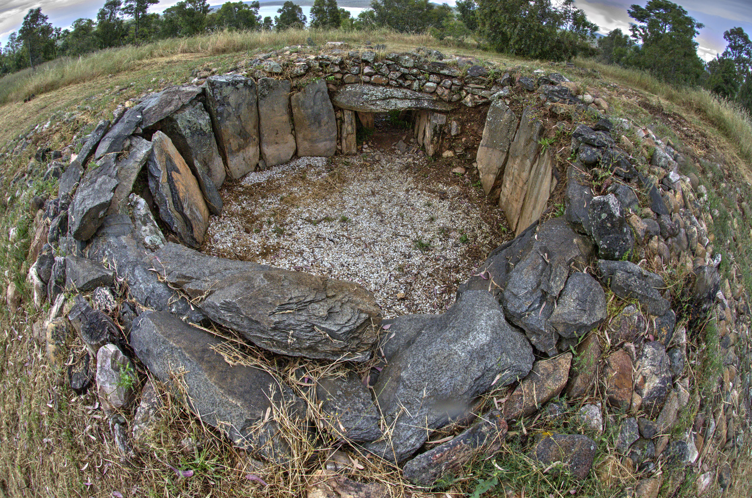 A este megalito se le llama más comúnmente dolmen de Valdecaballeros. Está en una península del embalse García de Sola, antes confluencia de los ríos Guadiana y Guadalupejo. Se le ha datado entre los milenios IV y II a.C. Actualmente conserva una cámara de unos 4 m de diámetro y un corredor de unos 10 m. Se conserva la cobija de entrada a la cámara.